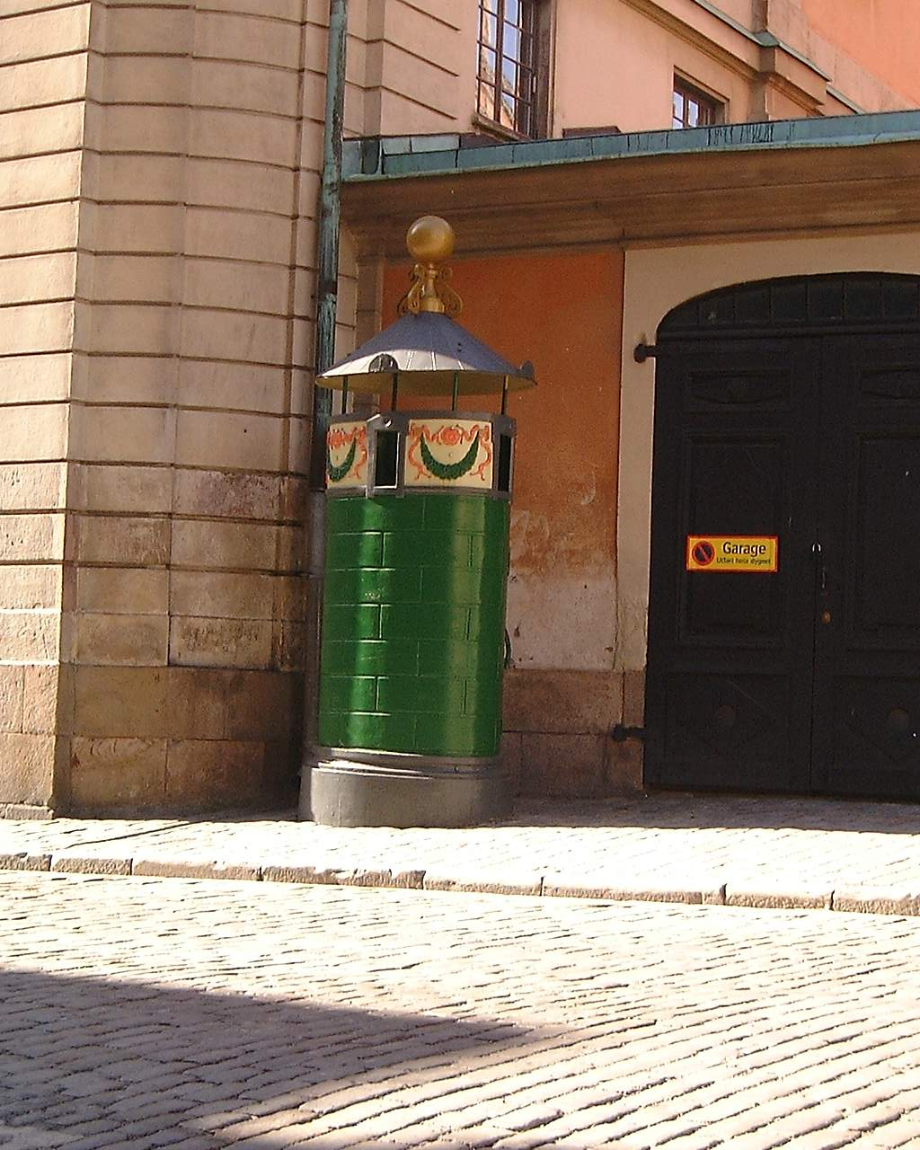 Old urinal at Källargränd, Gamla stan, Stockholm.